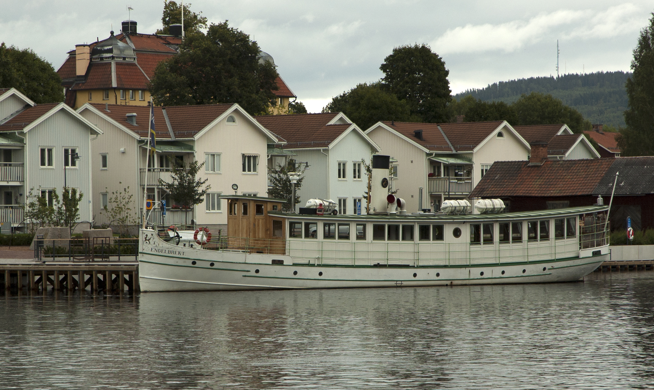 Passagerarångfartyg. Längd 21.4m, bredd 4.45m. Motortyp: kompoundångmaskin 80 IHK. This is an image of the protected Swedish ship Engelbrekt, with call sign SEVZ .